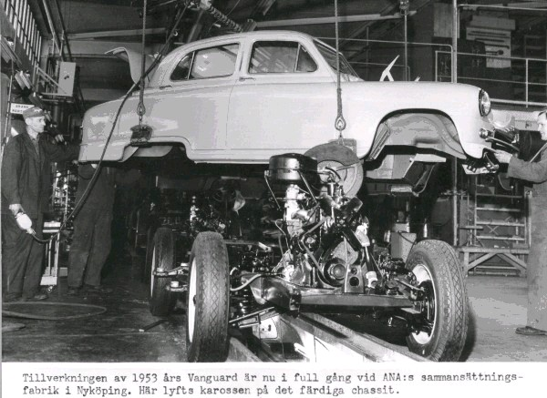 Tillverkningen av 1953 års Vanguard vid ANAs sammansättningsfabrik i Nyköping